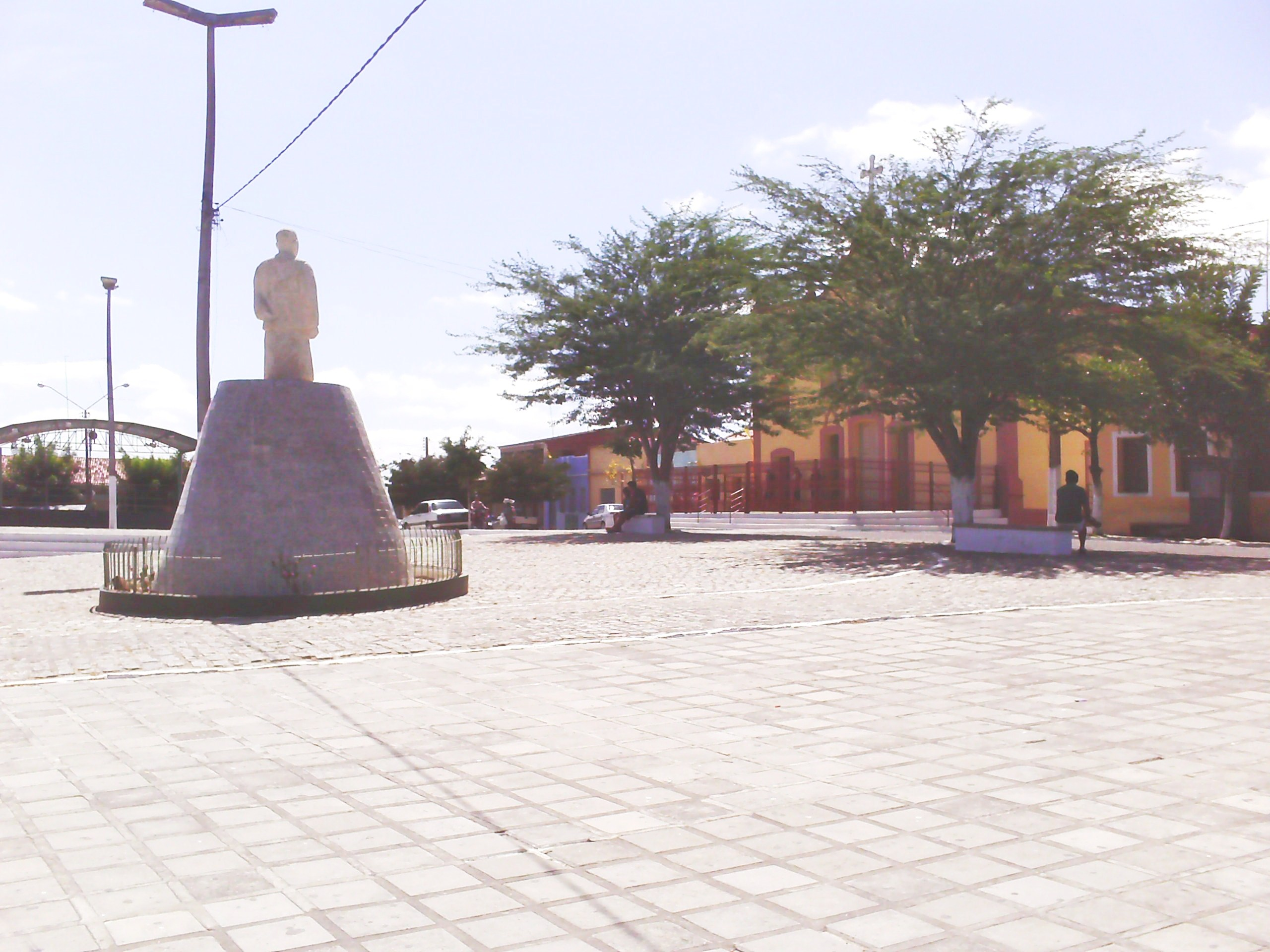 Vista parcial da principal praça da cidade